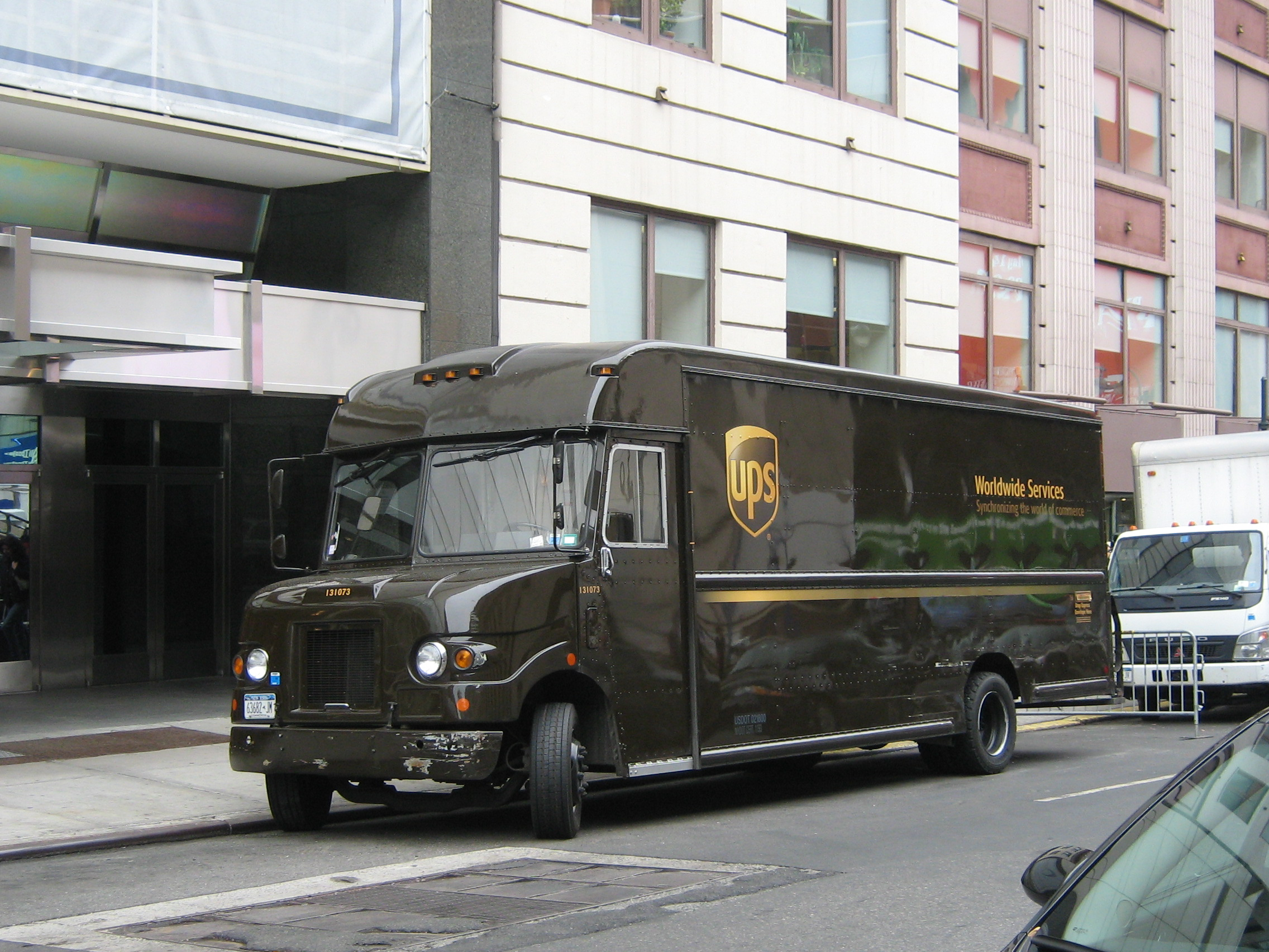 UPS truck